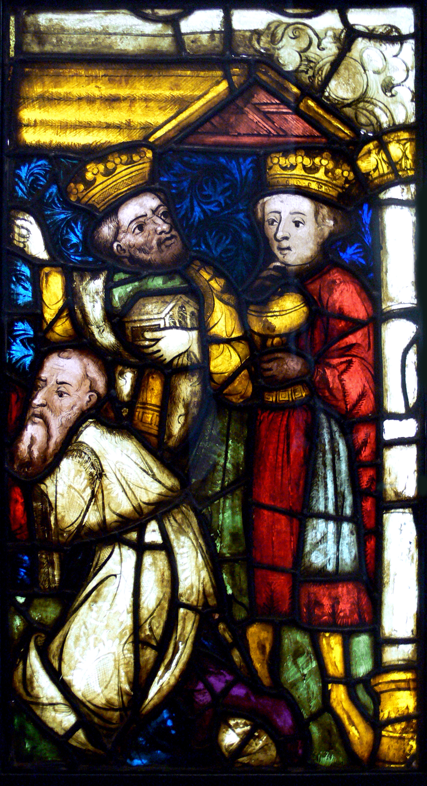 Heilige Drei Könige (aus einer Anbetungsszene), Köln (?) um 1400 Kunstgewerbemuseum Berlin, ohne Inv. Nr.